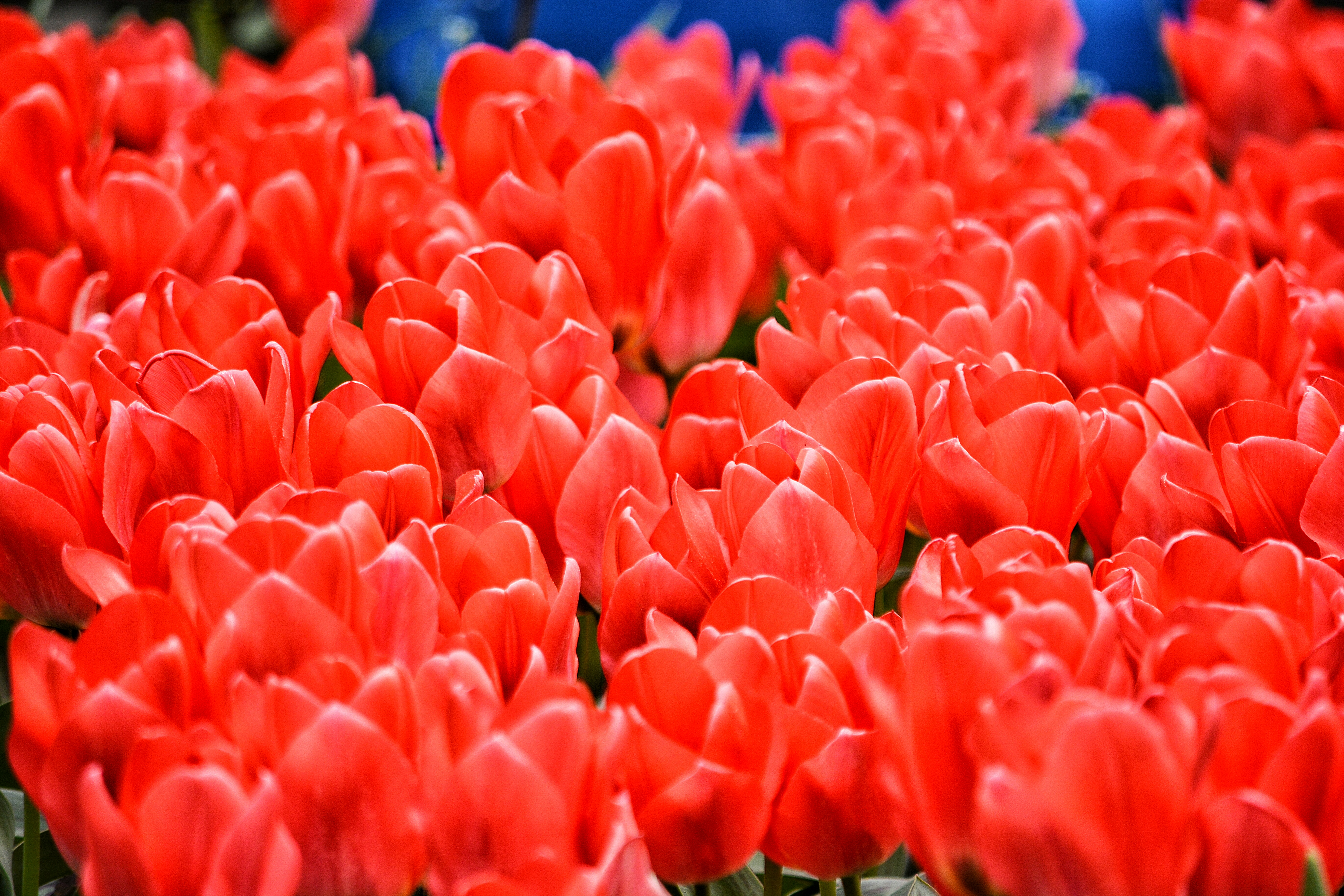 Чернівецький, м. Чернівці, вул. Федьковича, 11